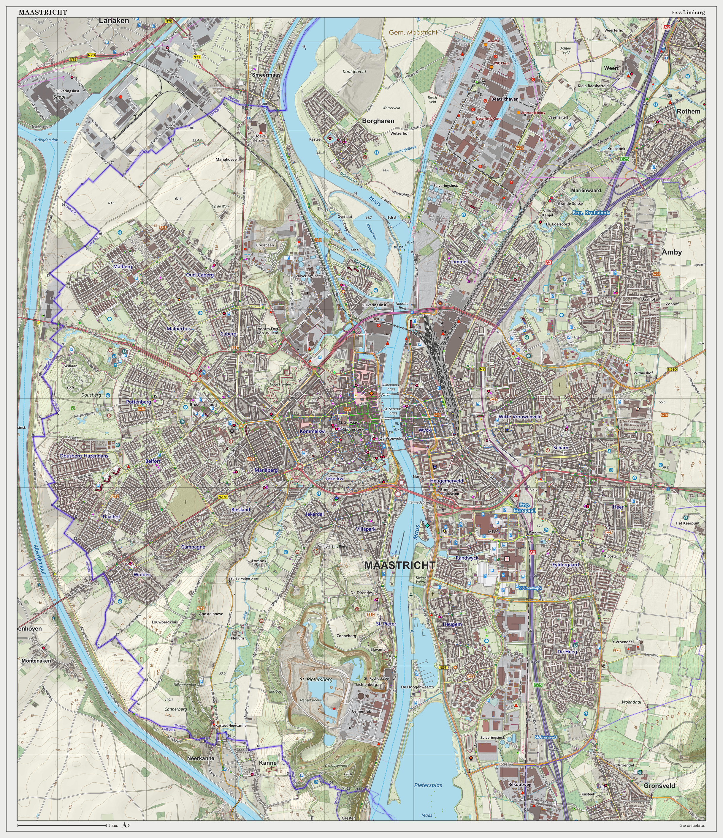 Topografische kaart van Maastricht (woonplaats). Resolutie: 300 pixels/km. Kaartbeeld samengesteld uit de open geodata van de Top10NL en Top25namen (Basisregistratie Topografie, Kadaster), Creative Commons BY licentie. Gebouwvlakken uit open geodata BAG extract. Wegen uit de OpenStreetMap. Reliëfschaduw uit de Actuele Hoogtekaart AHN2. Samenstelling en kleurenschema: Jan-Willem van Aalst, met QGIS2. Zie ook de Legenda.